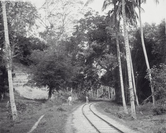 foto. De Atjeh-spoorlijn nabij Padangtidji, Atjeh